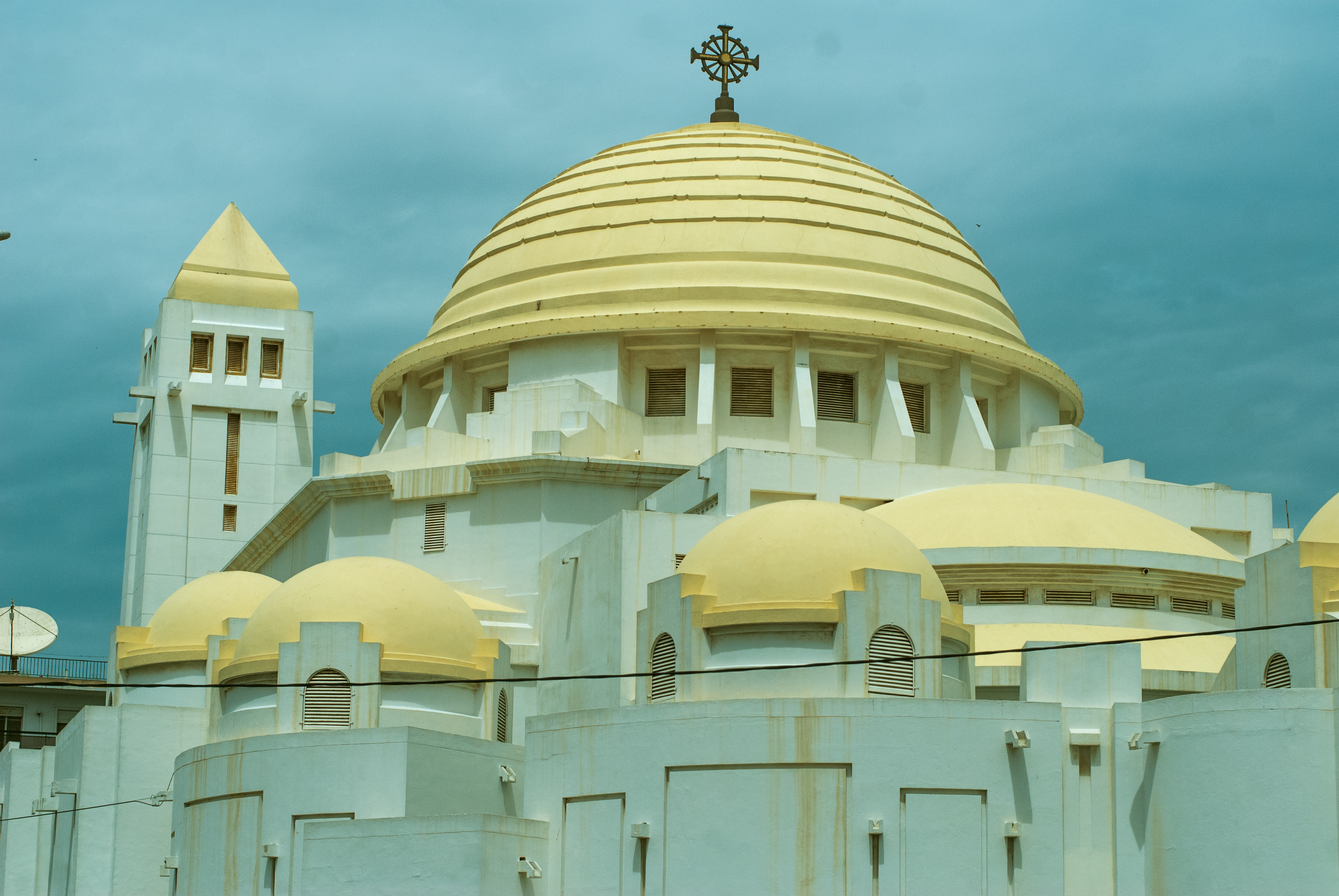 Photo: Adama Coulibaly